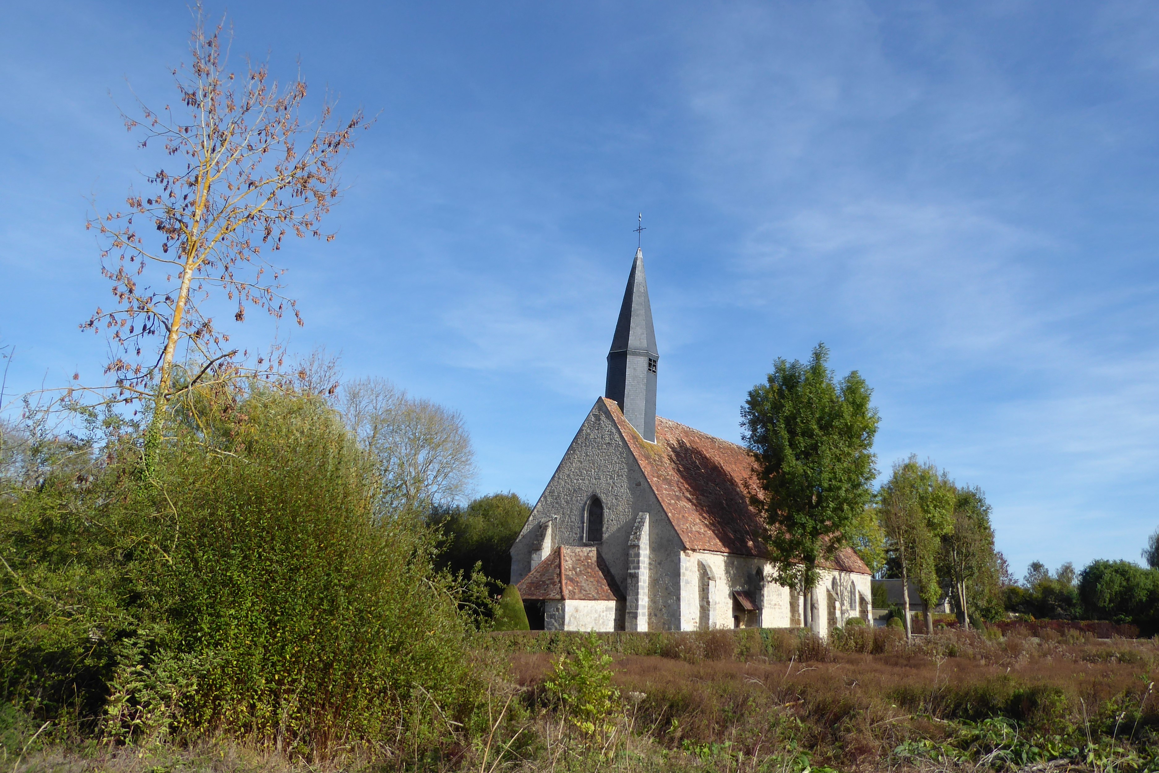 église Saint-Lucien de Saint-Lucien, Eure-et-Loir, France.